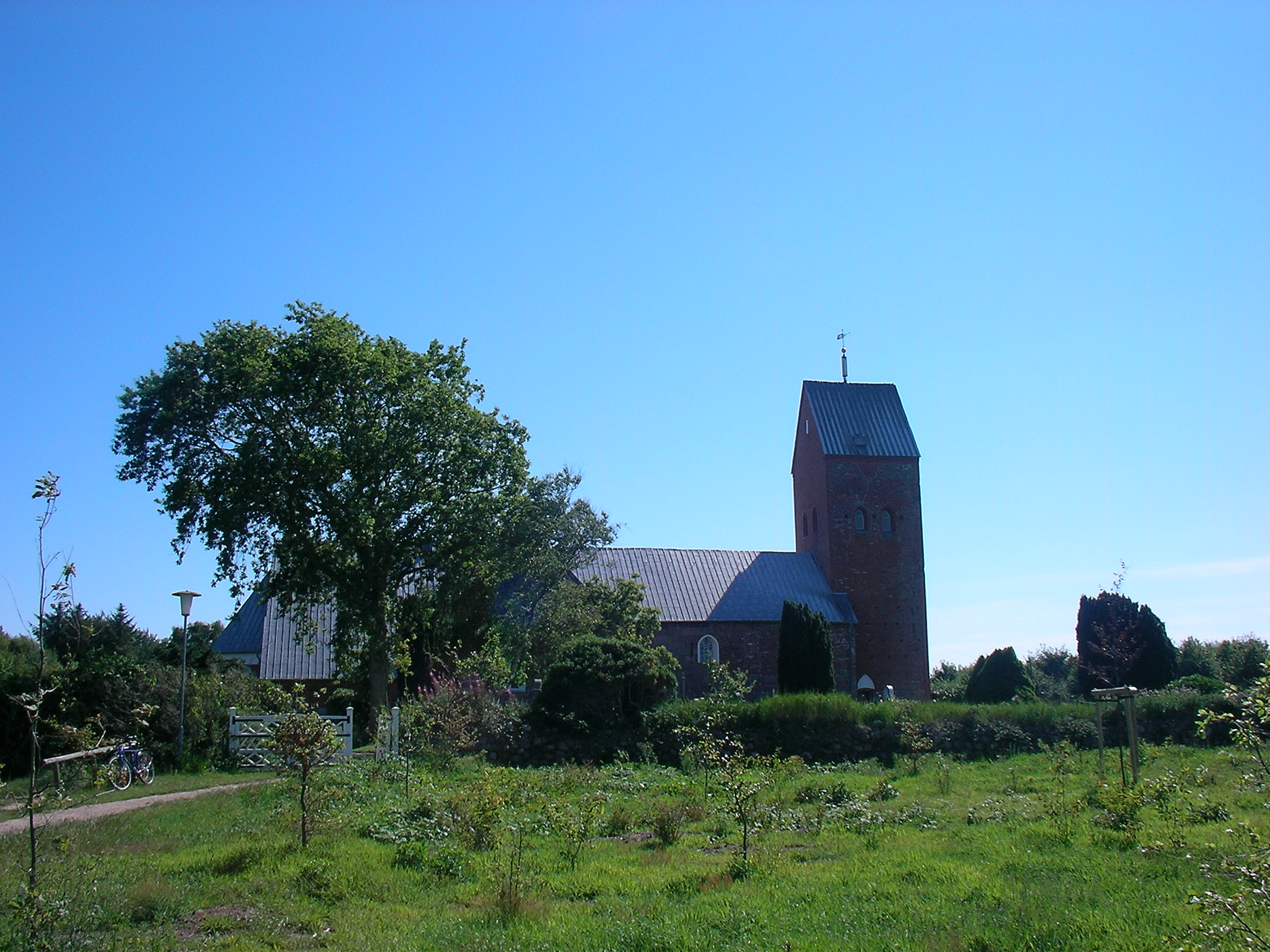 Süderende